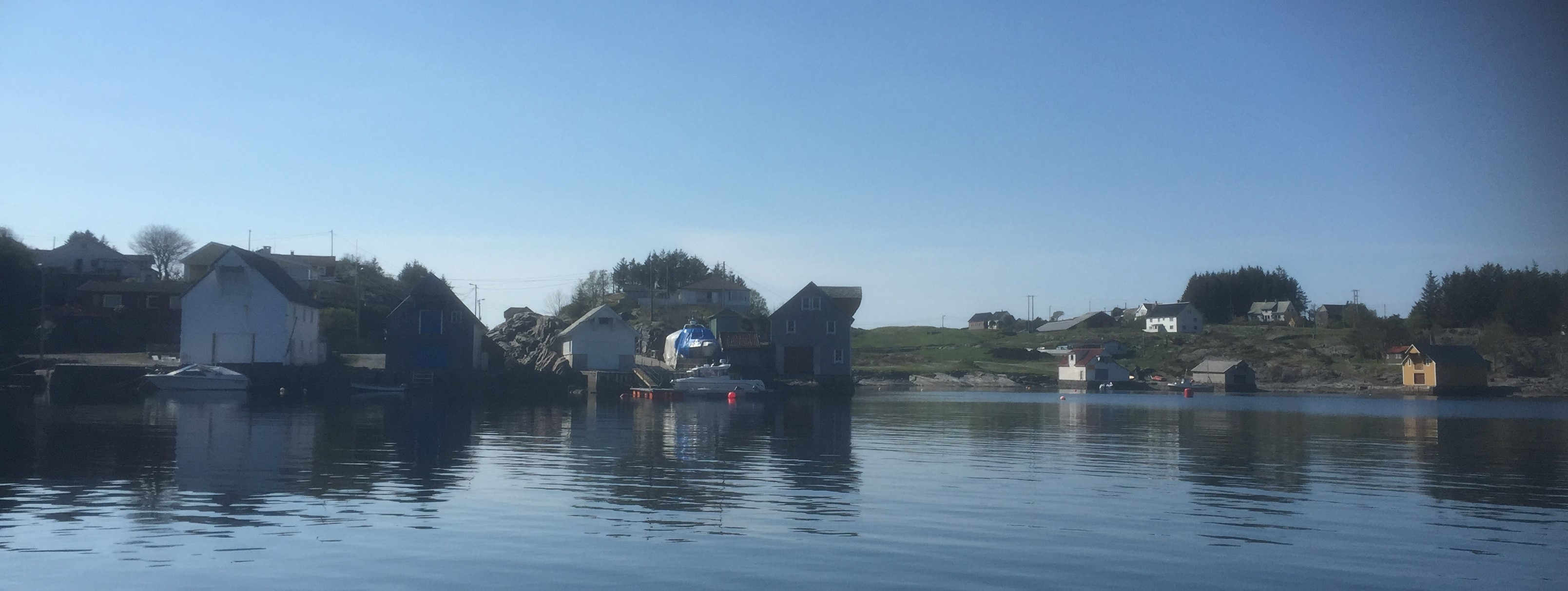 Bebeggelsen på Golta fotografert fra Goltaosen